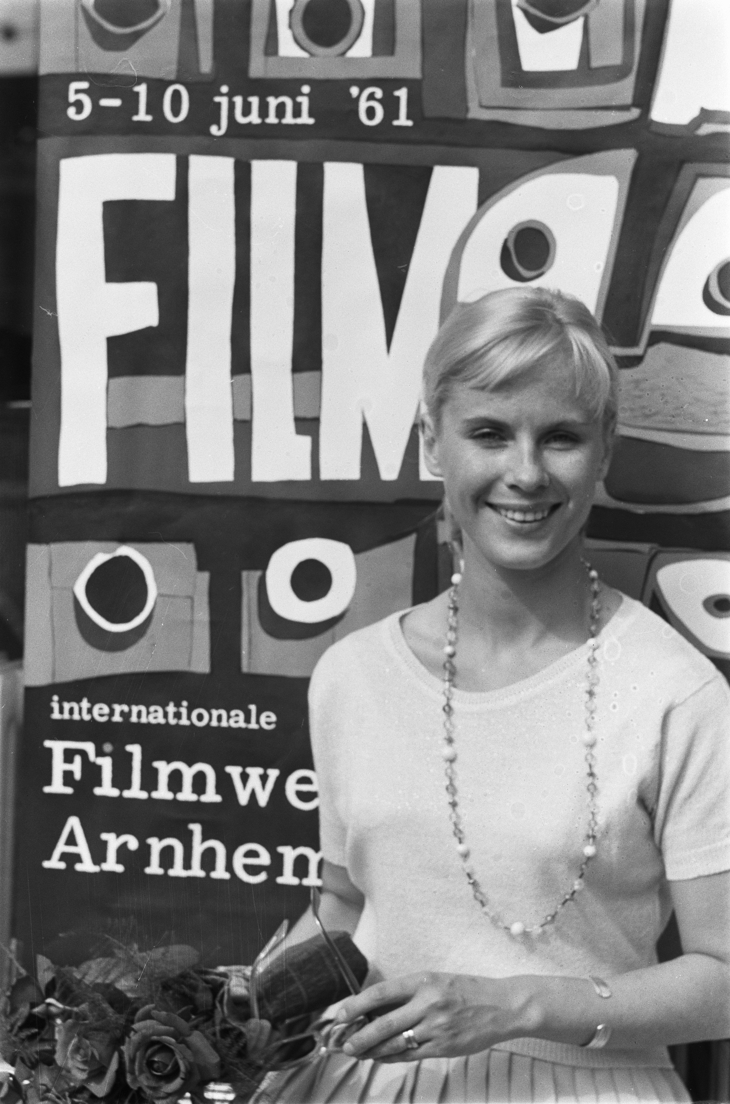 Collectie / Archief : Fotocollectie Anefo Reportage / Serie : [ onbekend ] Beschrijving : Filmweek Arnhem. Filmactrice Bibi Andersson voor affiche Filmweek Datum : 5 juni 1961 Locatie : Arnhem Trefwoorden : acteurs, filmfestivals, filmsterren, portretten Persoonsnaam : Andersson, Bibi Fotograaf : Pot, Harry / Anefo Auteursrechthebbende : Nationaal Archief Materiaalsoort : Negatief (zwart/wit) Nummer archiefinventaris : bekijk toegang 2.24.01.05 Bestanddeelnummer : 912-5648